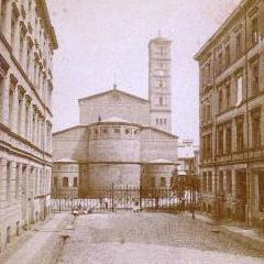 St. Jacobikirche in Berlin, Photographie aus dem 19. Jahrhundert.